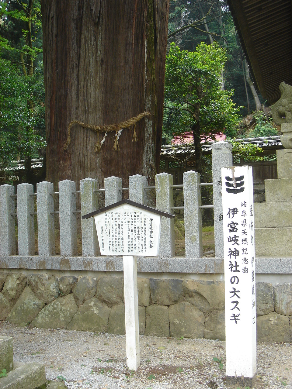 Ibuki Jinjya(Shrine)(伊富岐神社),Tarui,Gifu,Japan(岐阜県垂井町)で撮影